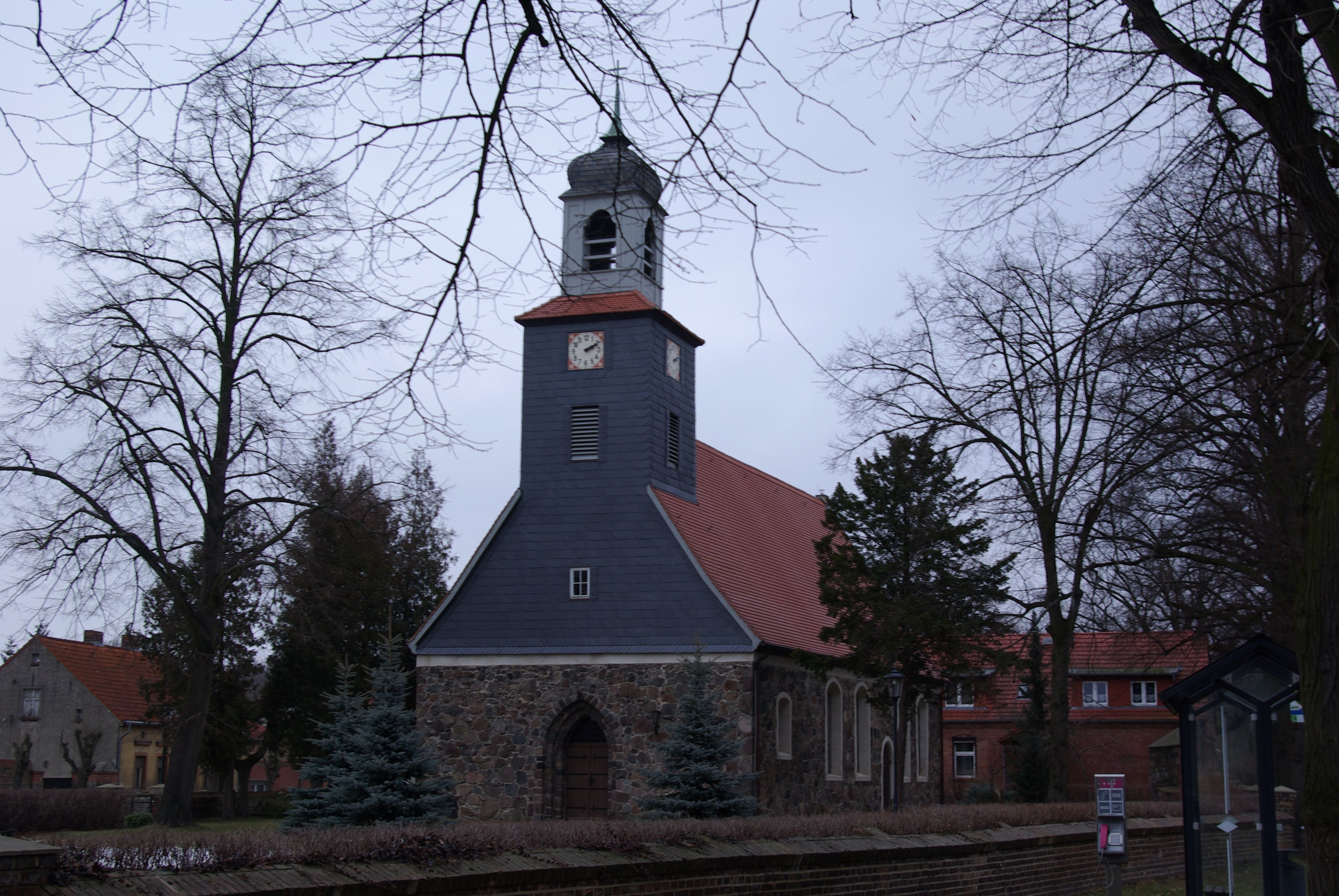 Mittenwald Ortsteil Schenkendorf in Brandenburg. Die Kirche stammt aus dem 14./15. Jahrhundert. Die Kirche steht unter Denkmalschutz.